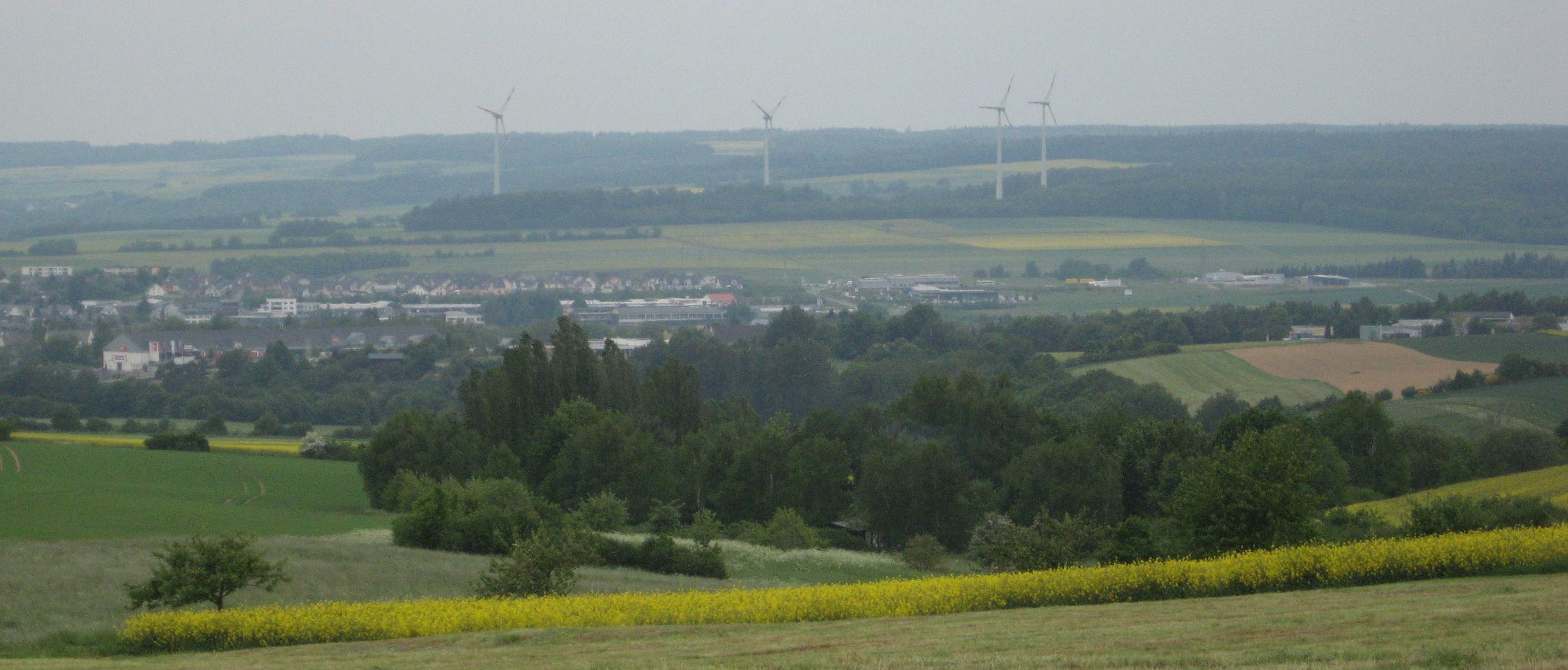 Simmern aus Richtung Südosten